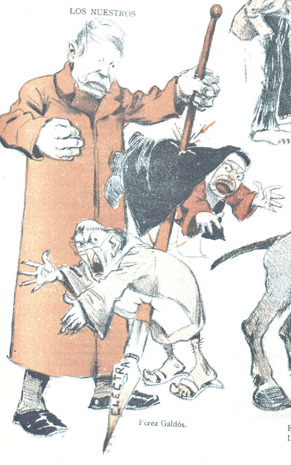 Caricatura.